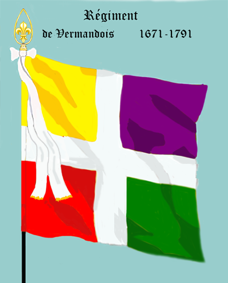 Ordonnanzfahne eines königlich französischen Infanterie-Regiments. - Entnommen und überarbeitet aus: „LES UNIFORMES ET LES DRAPEAUX DE L'ARMÉE DU ROI“ Marseille 1899. (Drapeau d'Ordonnance d' un régiment française d'infanterie royale.)